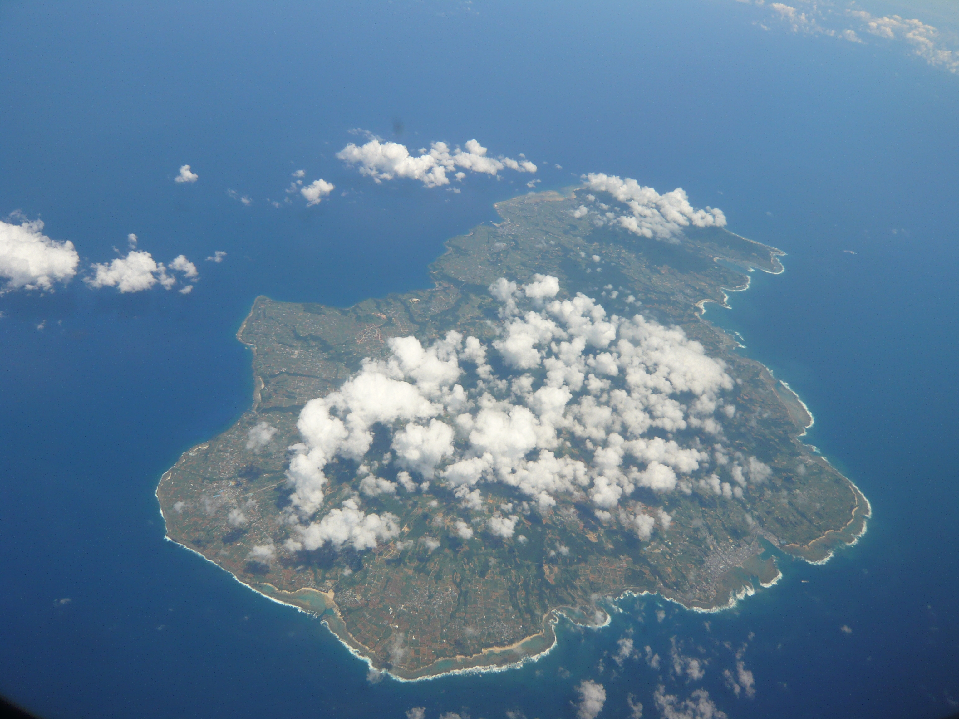 徳之島全景。機内より撮影